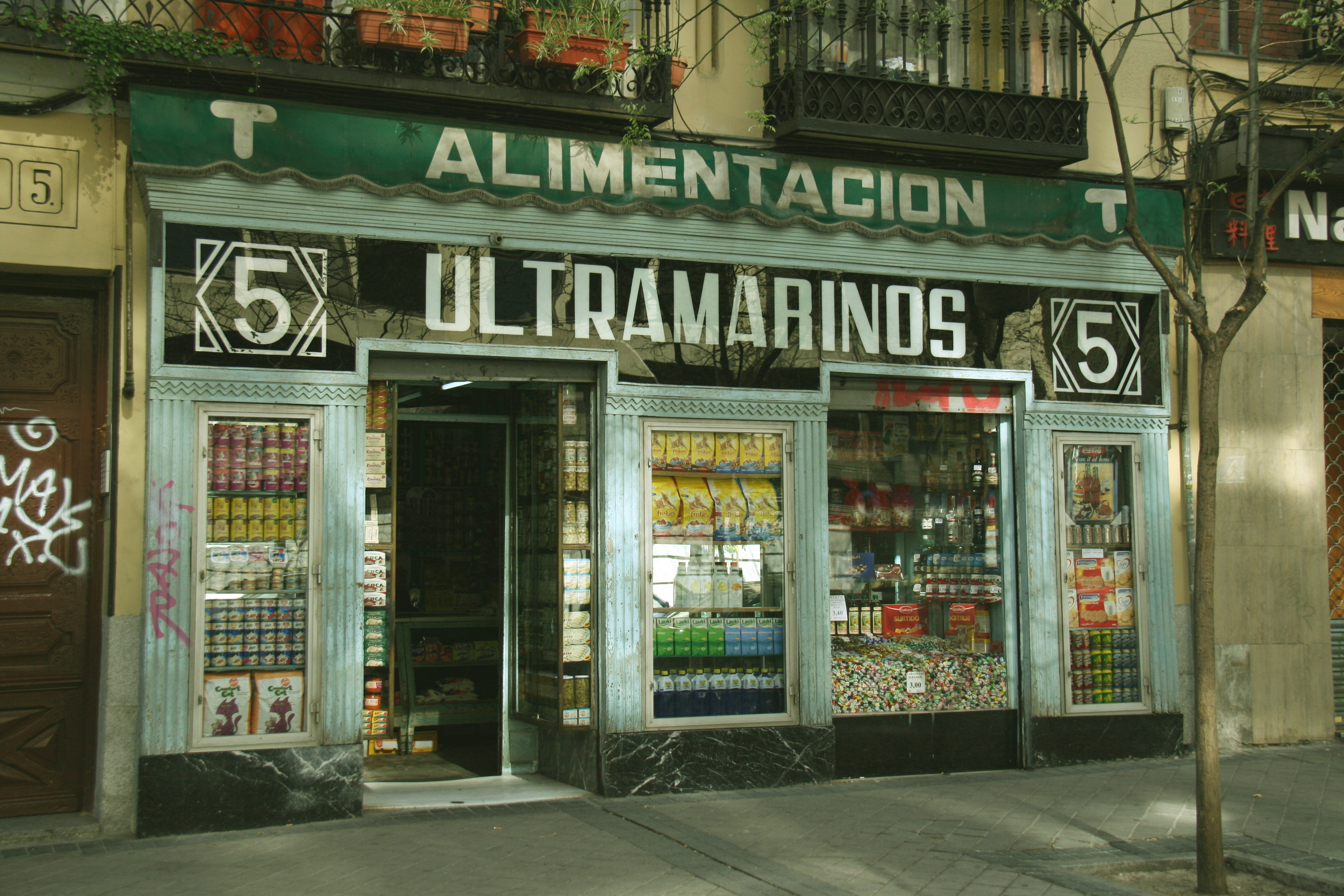 Tienda de Ultramarinos (Madrid) - c/Francisco de Rojas